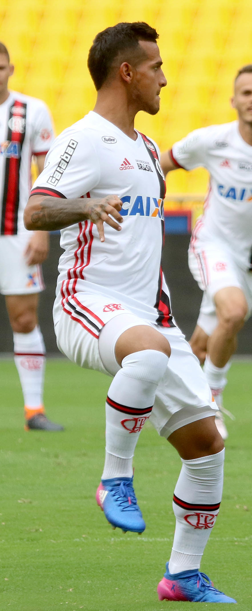 Guayaquil, martes 13 de marzo del 2018 (Andes).-El equipo brasileño Flamengo entrenó en el estadio Monumental previo al partido contra Emelec por el grupo D de la Copa Libertadores a jugarse mañana miércoles en el estadio George Capwell. Foto:Andes/César Muñoz